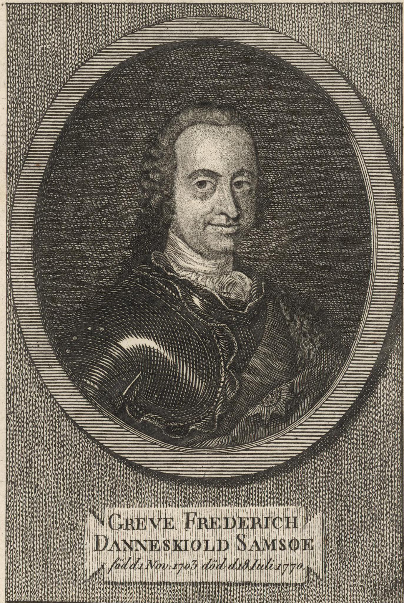 Illustrasjon hentet fra boken "Bidrag til Hr. General Admiral Lieutenant Greve Friderik Danneskiold Samsøes Levnets Beskrivelse" av Treschow, Herman og utgitt av Trykt hos Directeur Johan Frederik Schultz (dk, 1796)